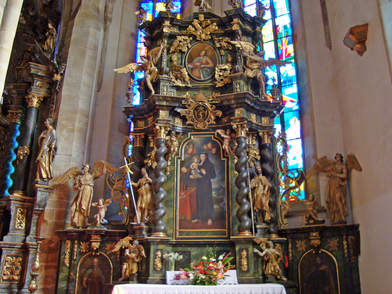 Oltár sv. Antona Paduánskeho v Konkatedrále sv. Mikuláša, Prešov